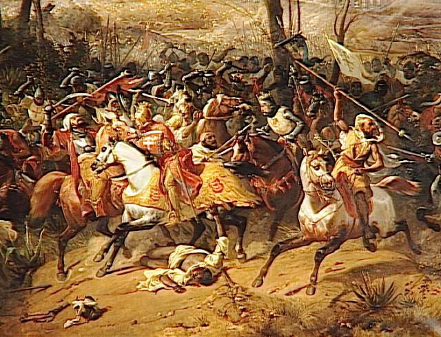 Historiengemälde